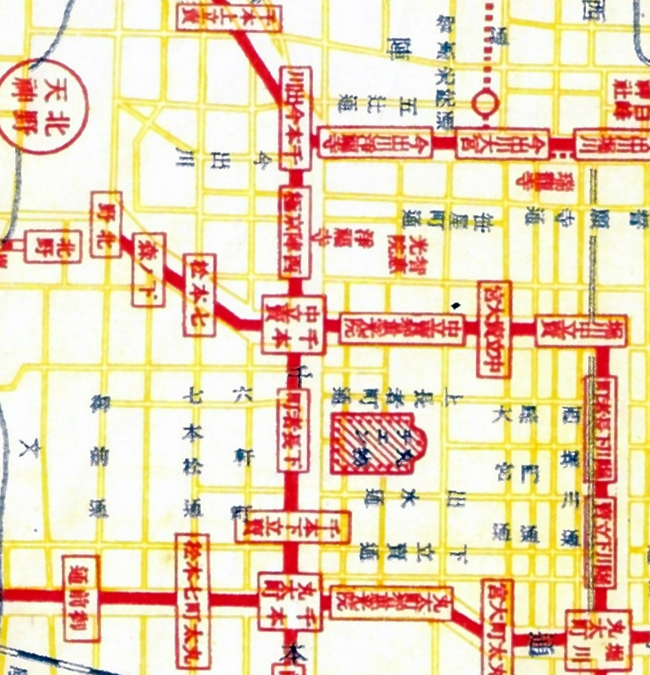 『京都市電 路線図 昭和6年』のうち「千本中立賣」電停を中心に抜粋。